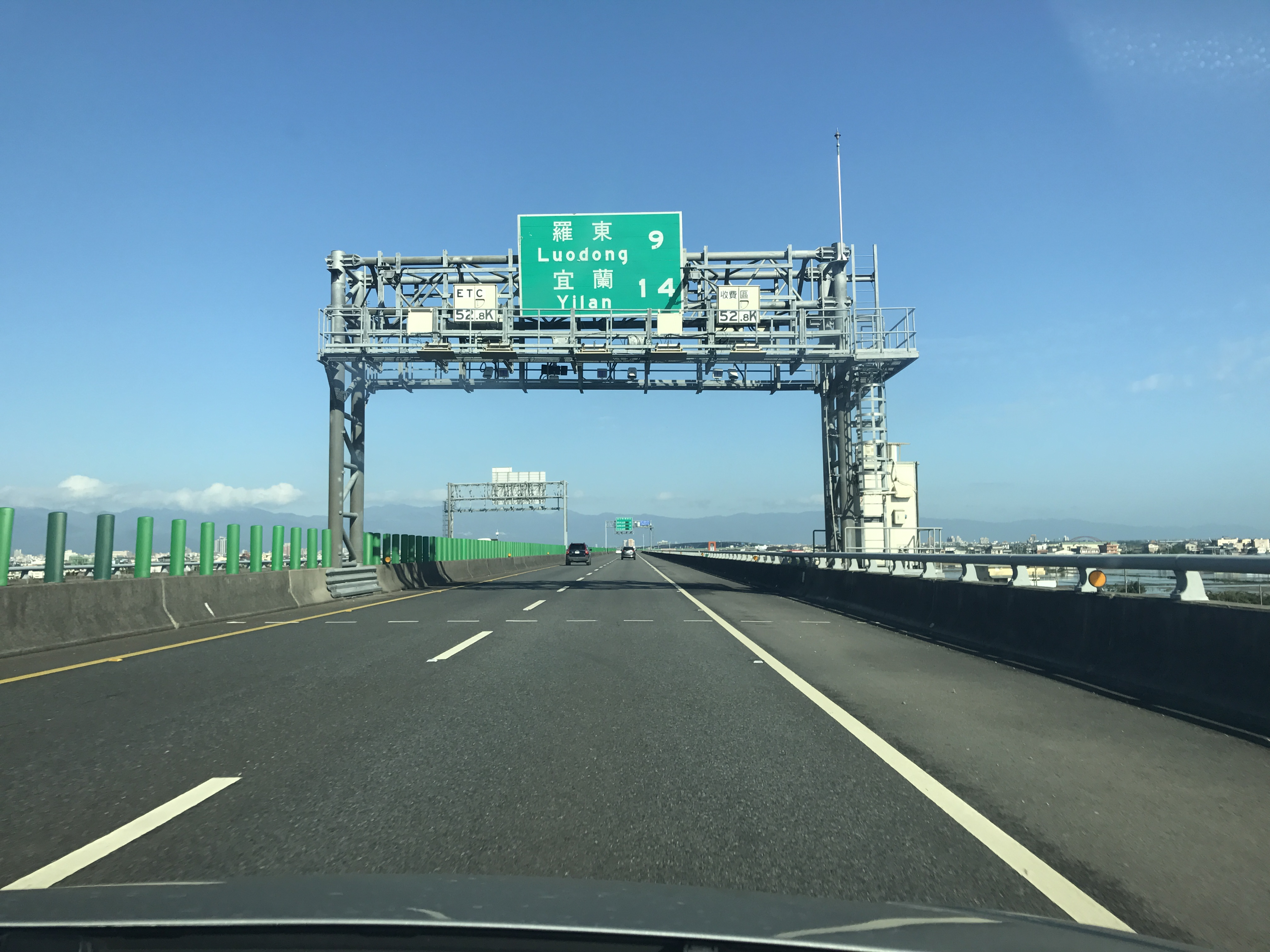 中文（台灣）: 國道五號 位於蘇澳路段 北上